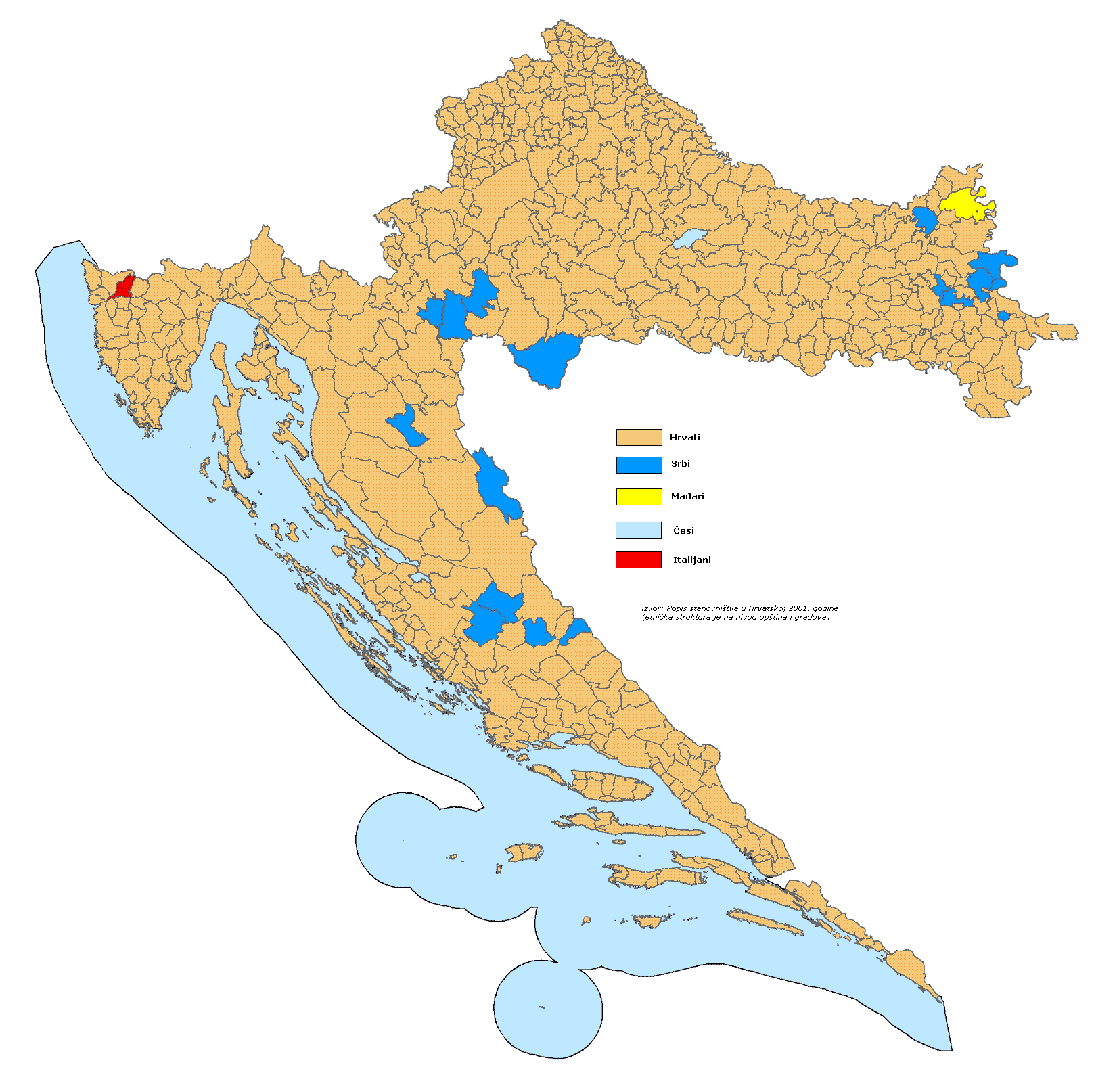 Етничка карта Хрватске